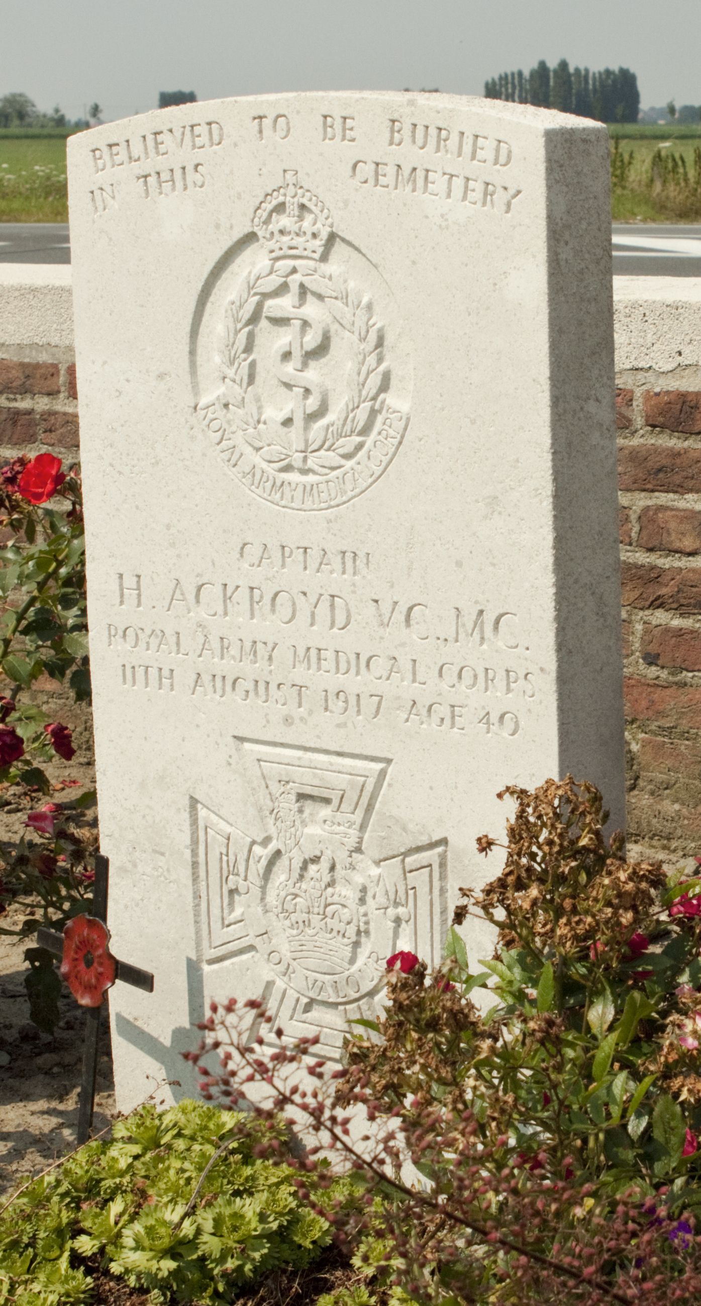 Birr Cross Roads Cemetery. Harold Ackroyd VC